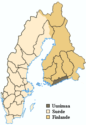 Travail maison, carte de Finlande au XVIIe siècle